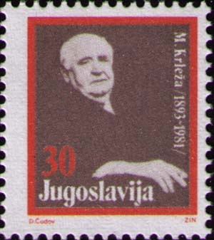 Miroslav Krleža